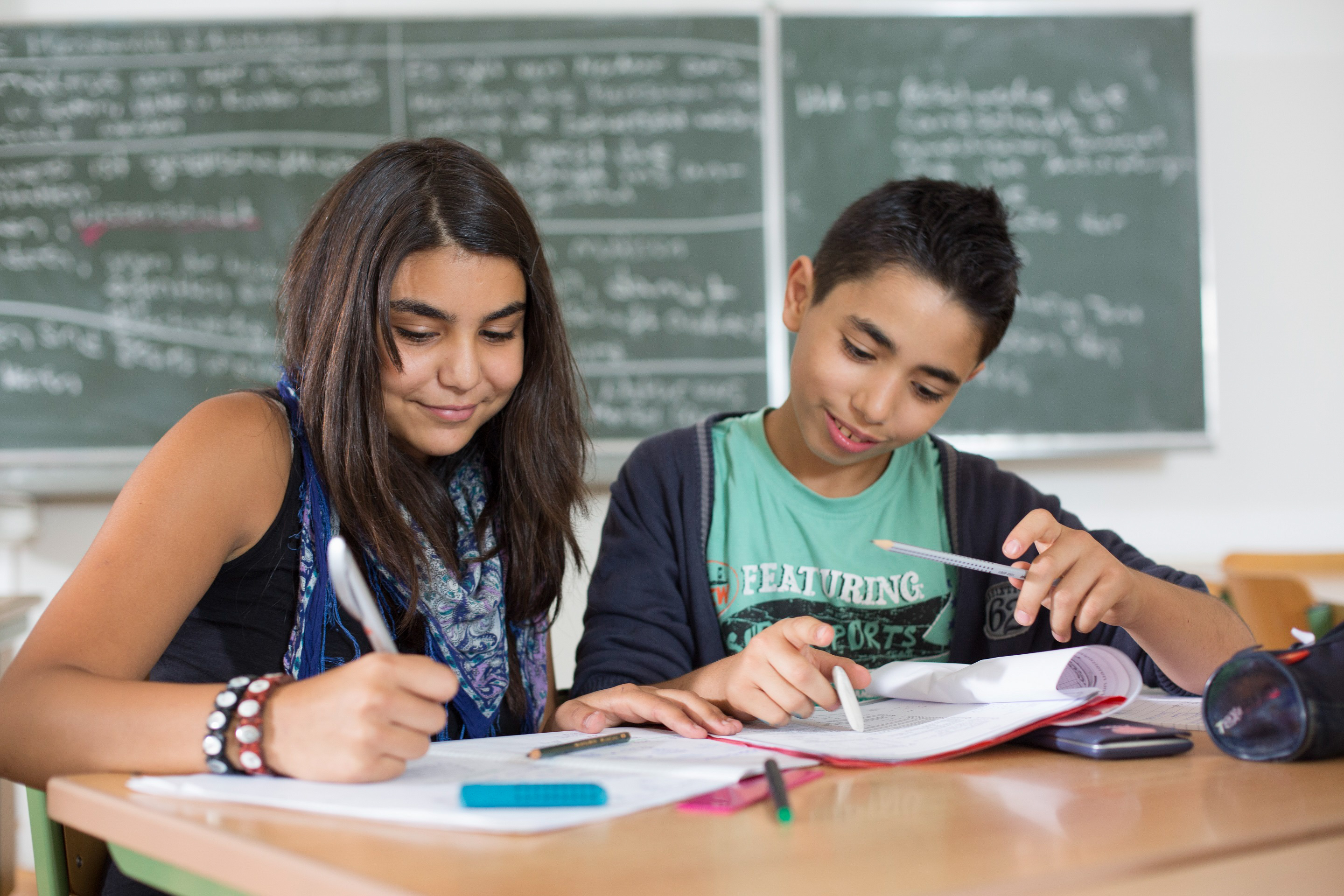 Kinder beim Lernen in der Lernförderung von Chancenwerk.